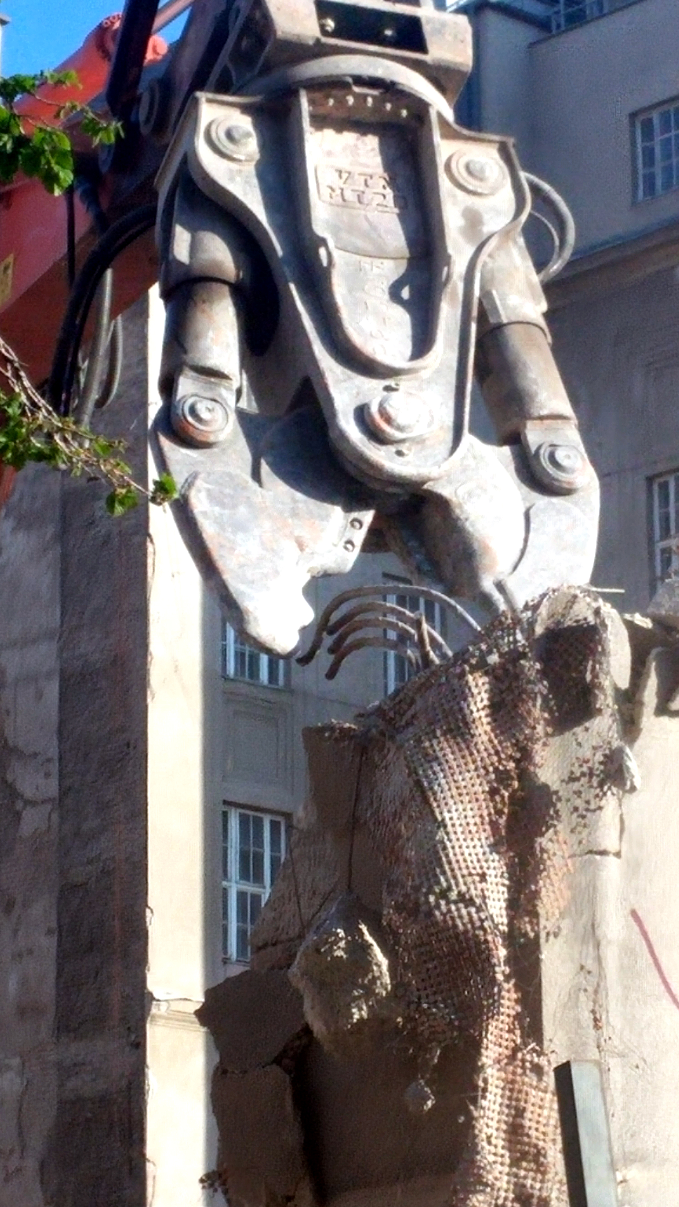 letzte Reste des Postamtsgebäudes 1030 Wien, Maria-Eis-Gasse 1, Wien 3, Landstraße im Abriss Mitte/Ende April 2015